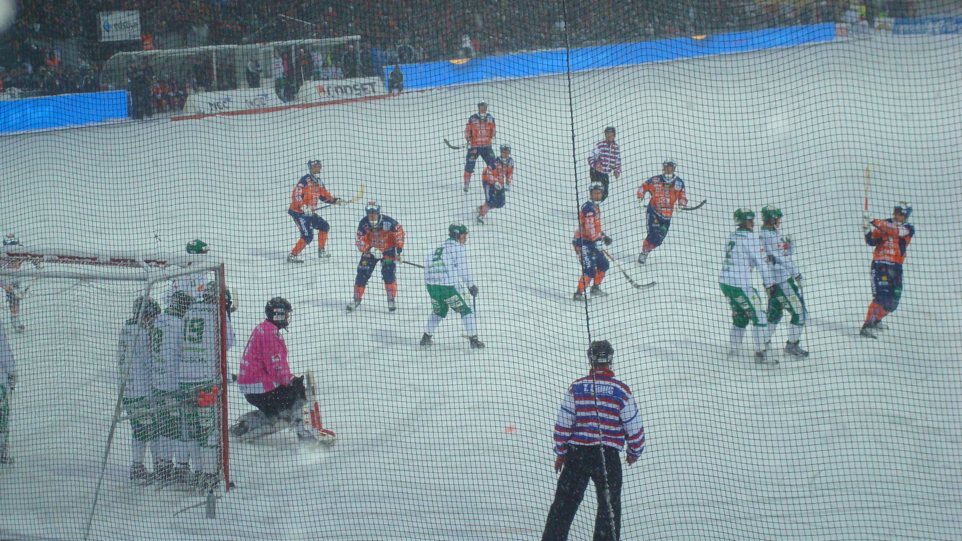 Bandyfinalen 2010, Bollnäs har precis slagit en hörna.